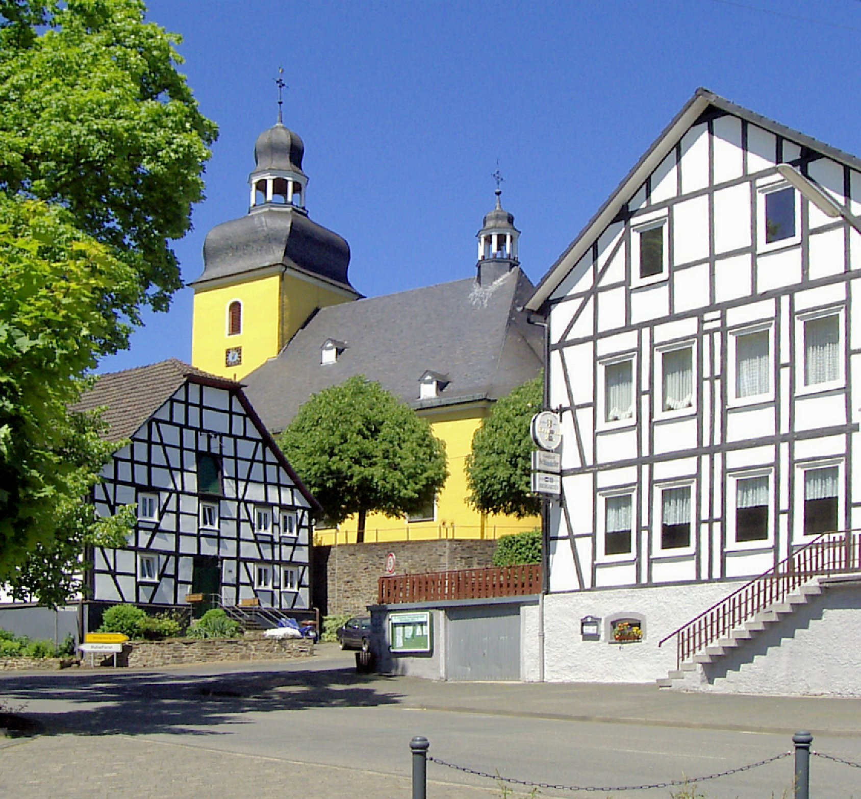 Blick auf die Kirche St. Sebastianus im Ortskern von Friesenhagen, Landkreis Altenkirchen (Westerwald), Rheinland-Pfalz, Deutschland